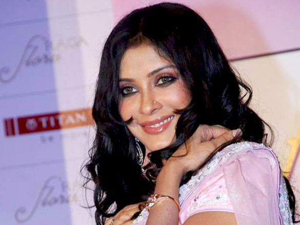 Nandana Sen launches Titan 'Raga Flora' collection